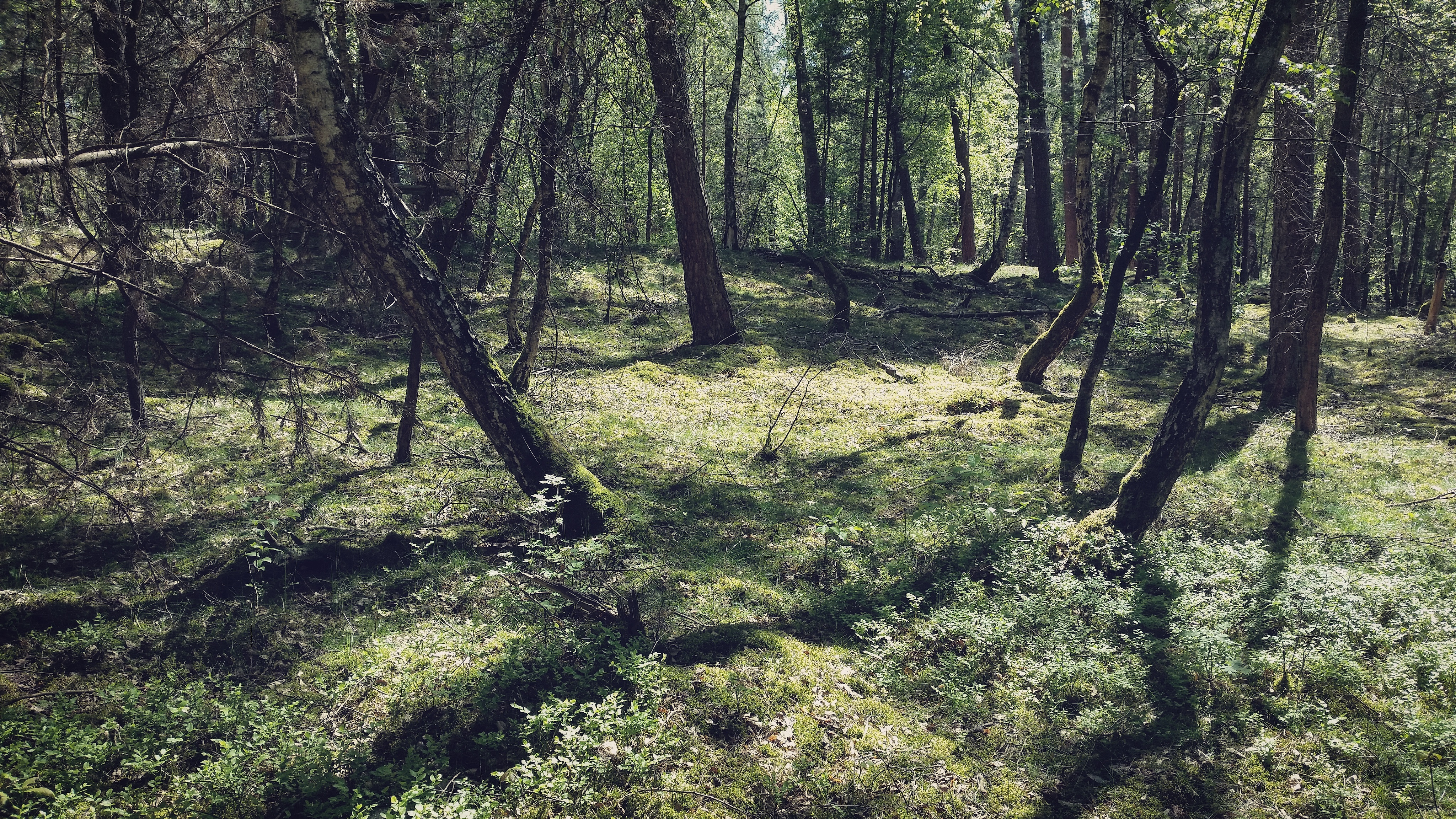 Das Bild zeigt eine Szenerie der Alzenauer Sande.